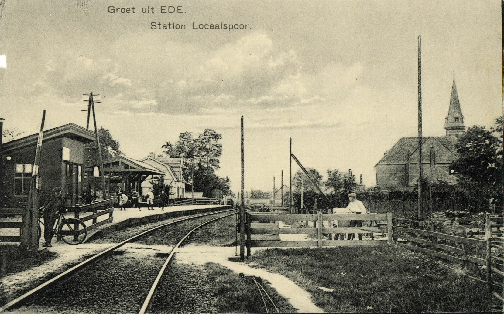 Gezicht op de N.C.S.-halte Ede Gemeentehuis te Ede.